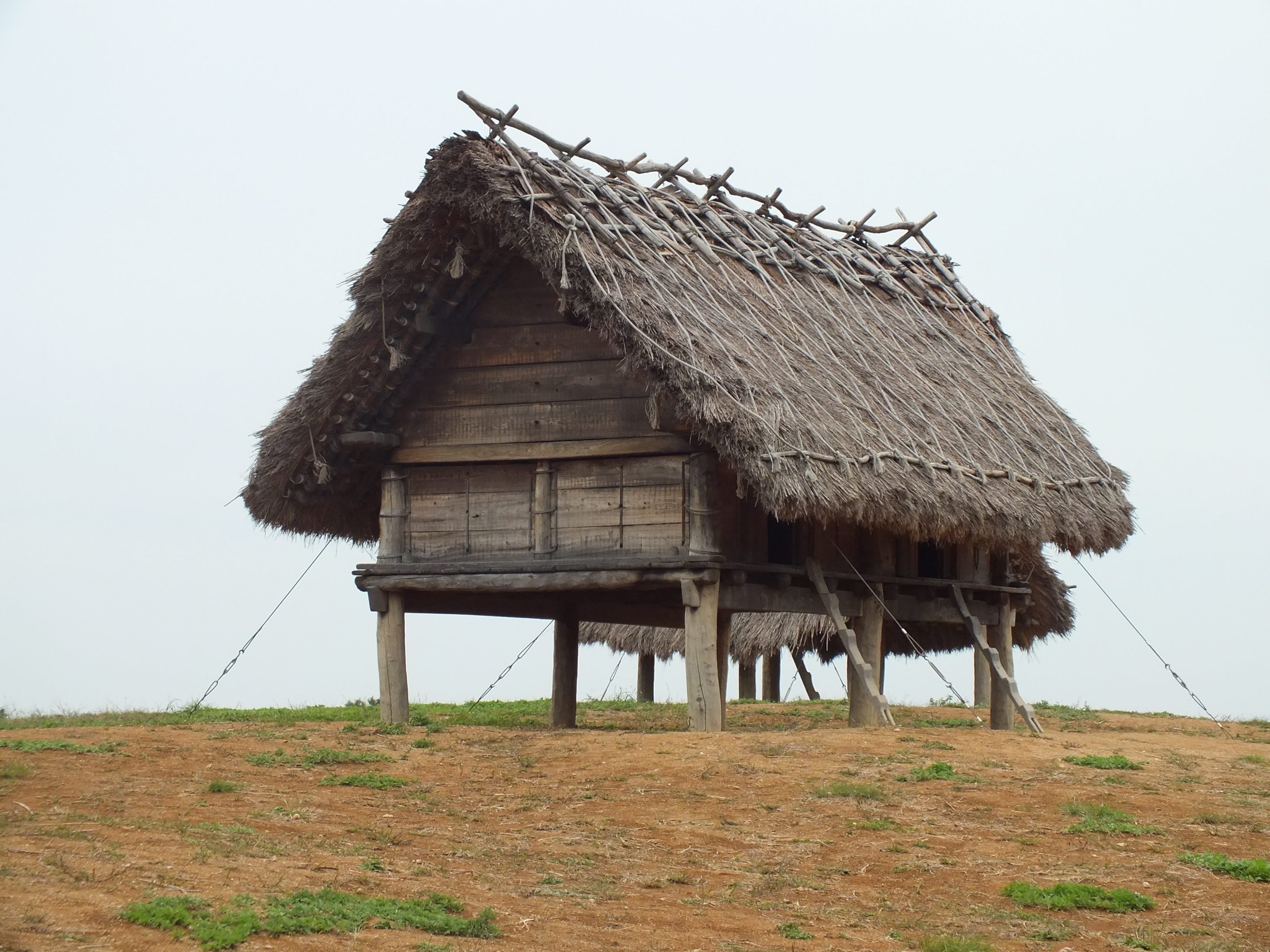 むきばんだ遺跡 高床式ホーム